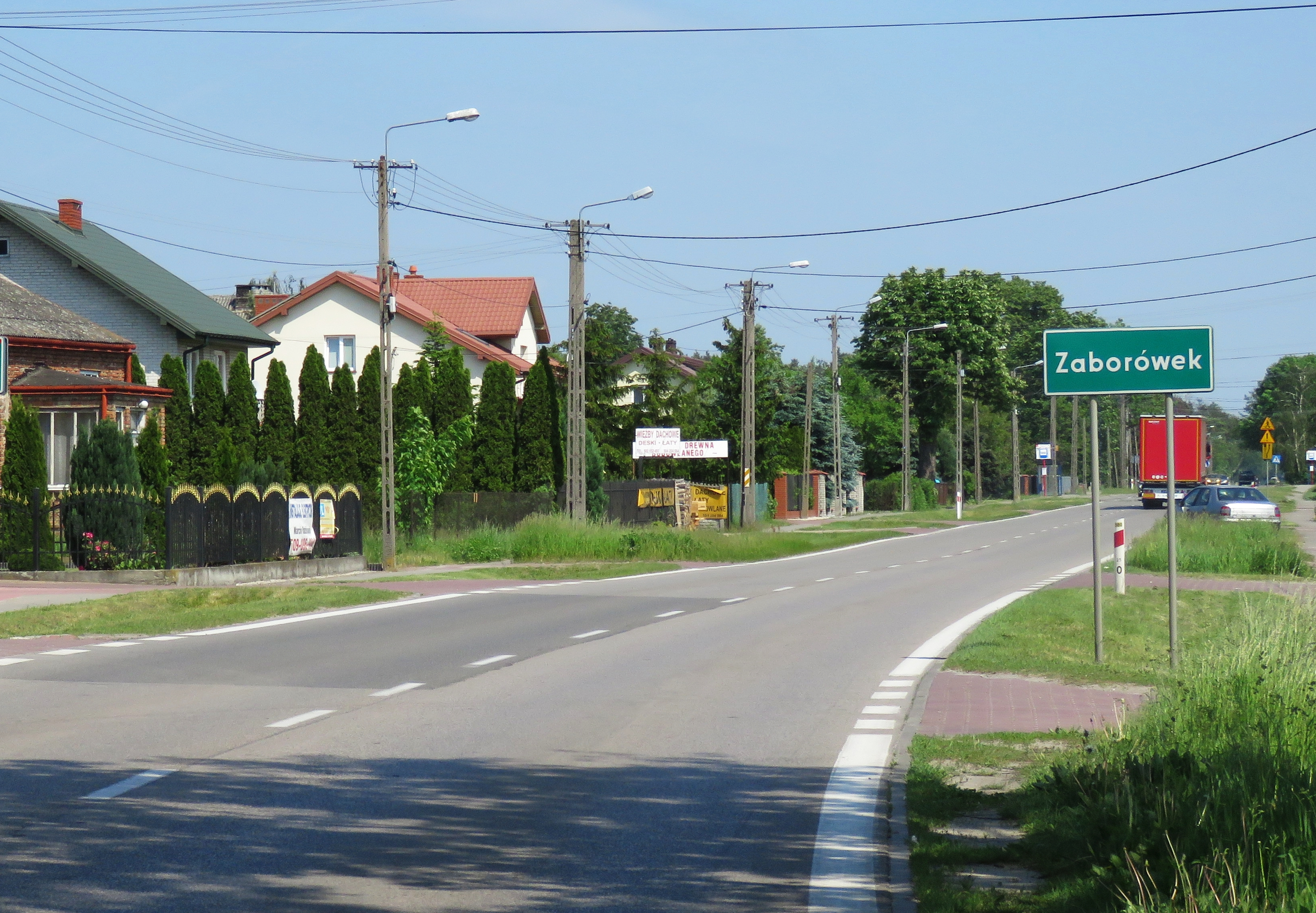 Zaborówek, gm. Leszno